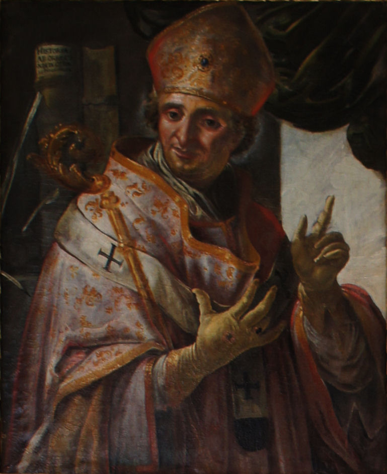 Porträtgemälde von Otto von Freising, Bischof von Freising, im Fürstengang zwischen Fürstbischöflicher Residenz und Freisinger Dom.